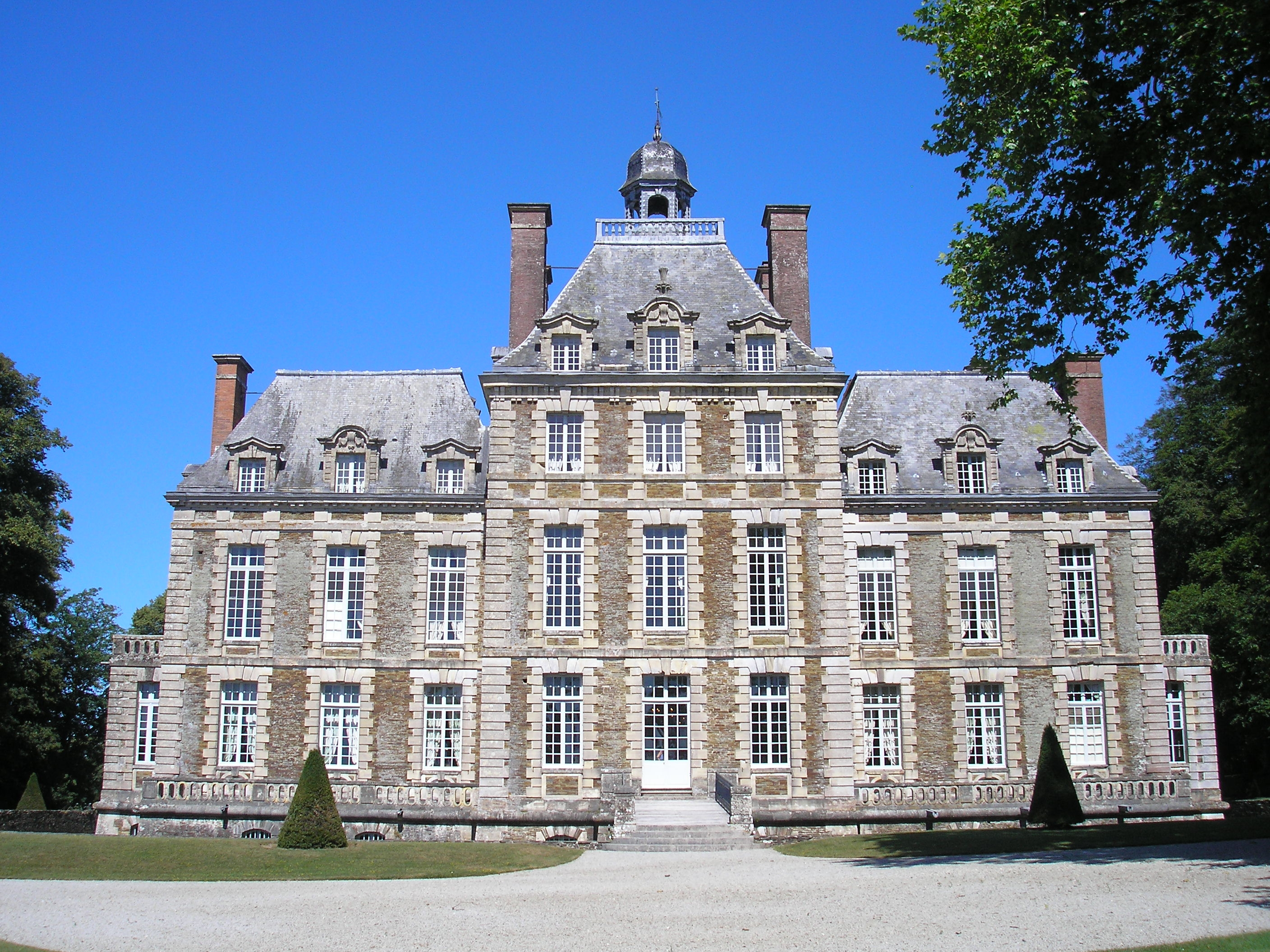 Balleroy (Normandie, France). Façade ouest du château.